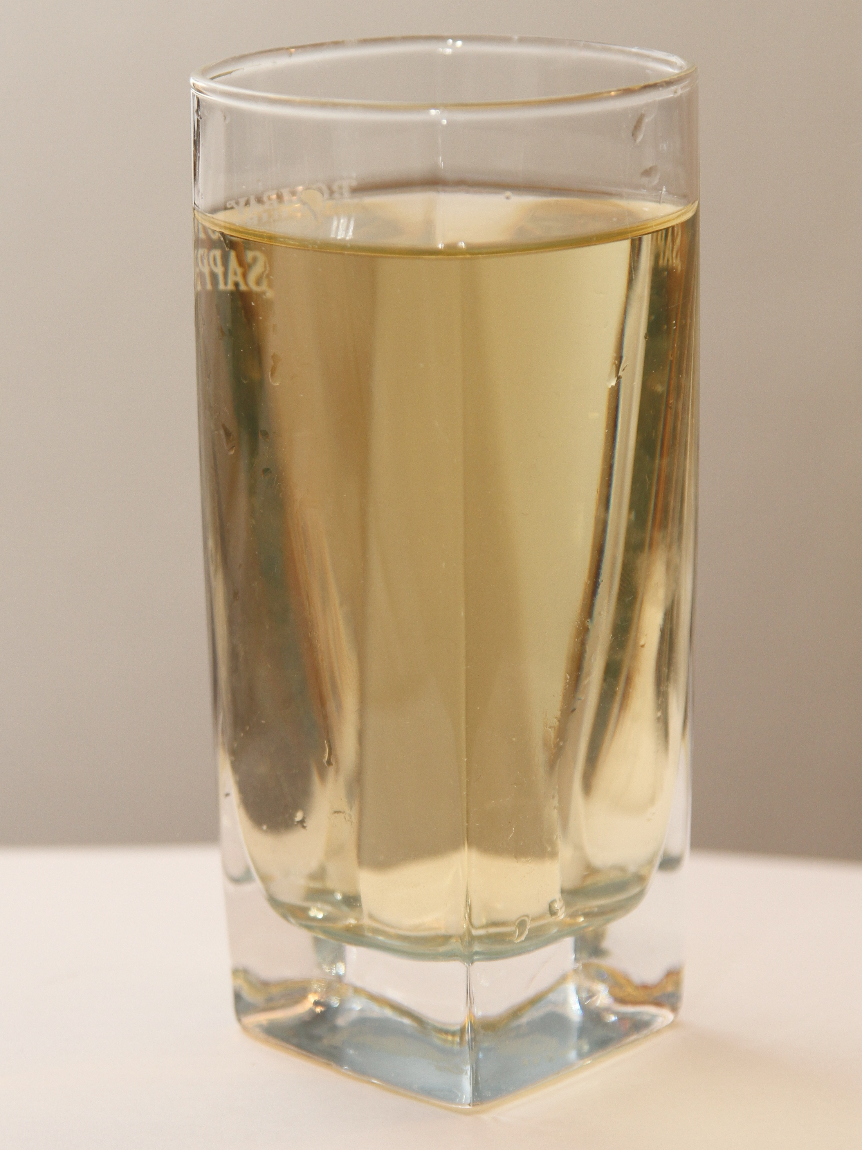 Pjolter, whisky blandet med soda.